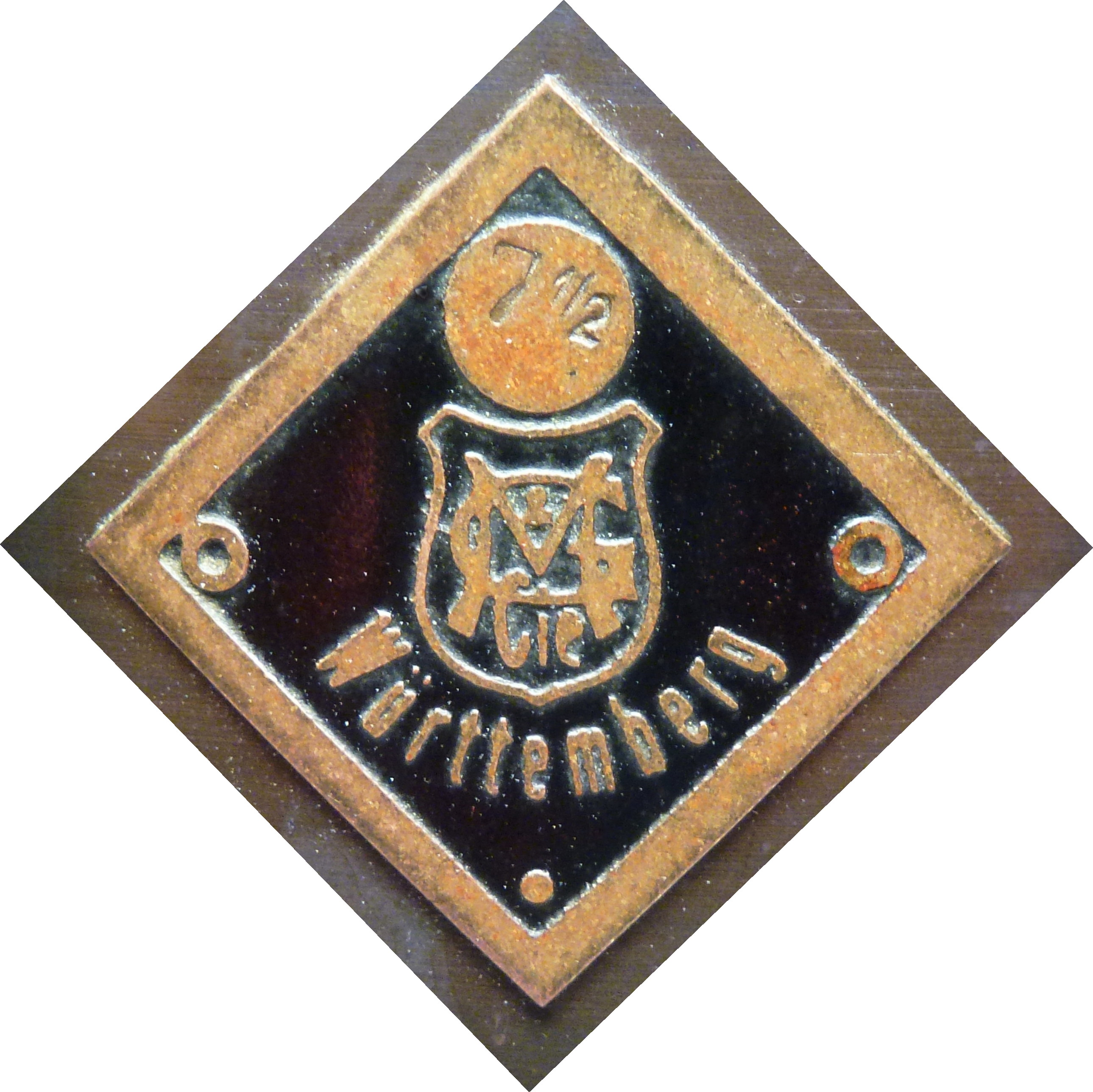 Märklin skylt på ångmaskin ca 1915